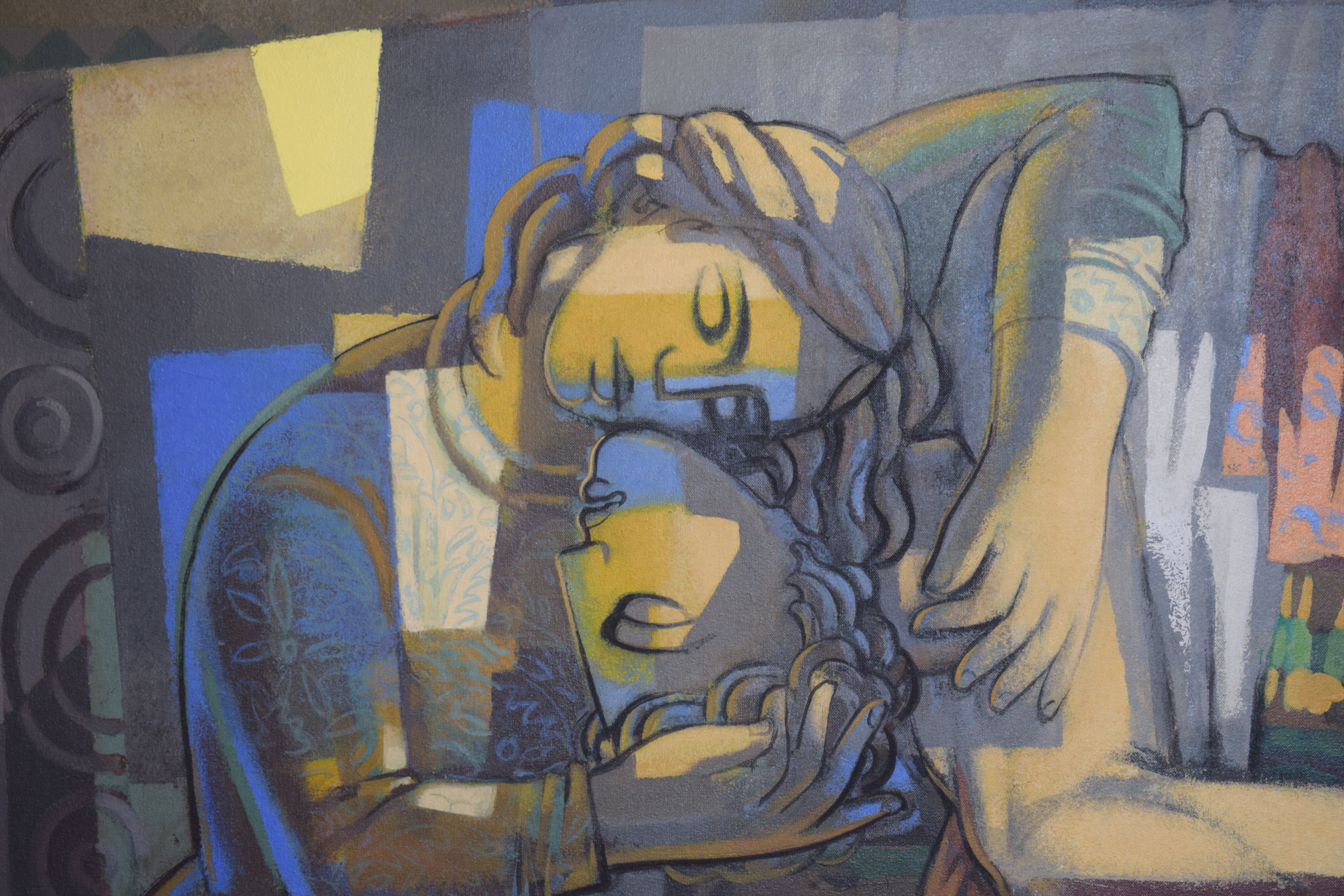 Amantes de Teruel. Detalle del cuadro "El amor nuevo" de Jorge Gay